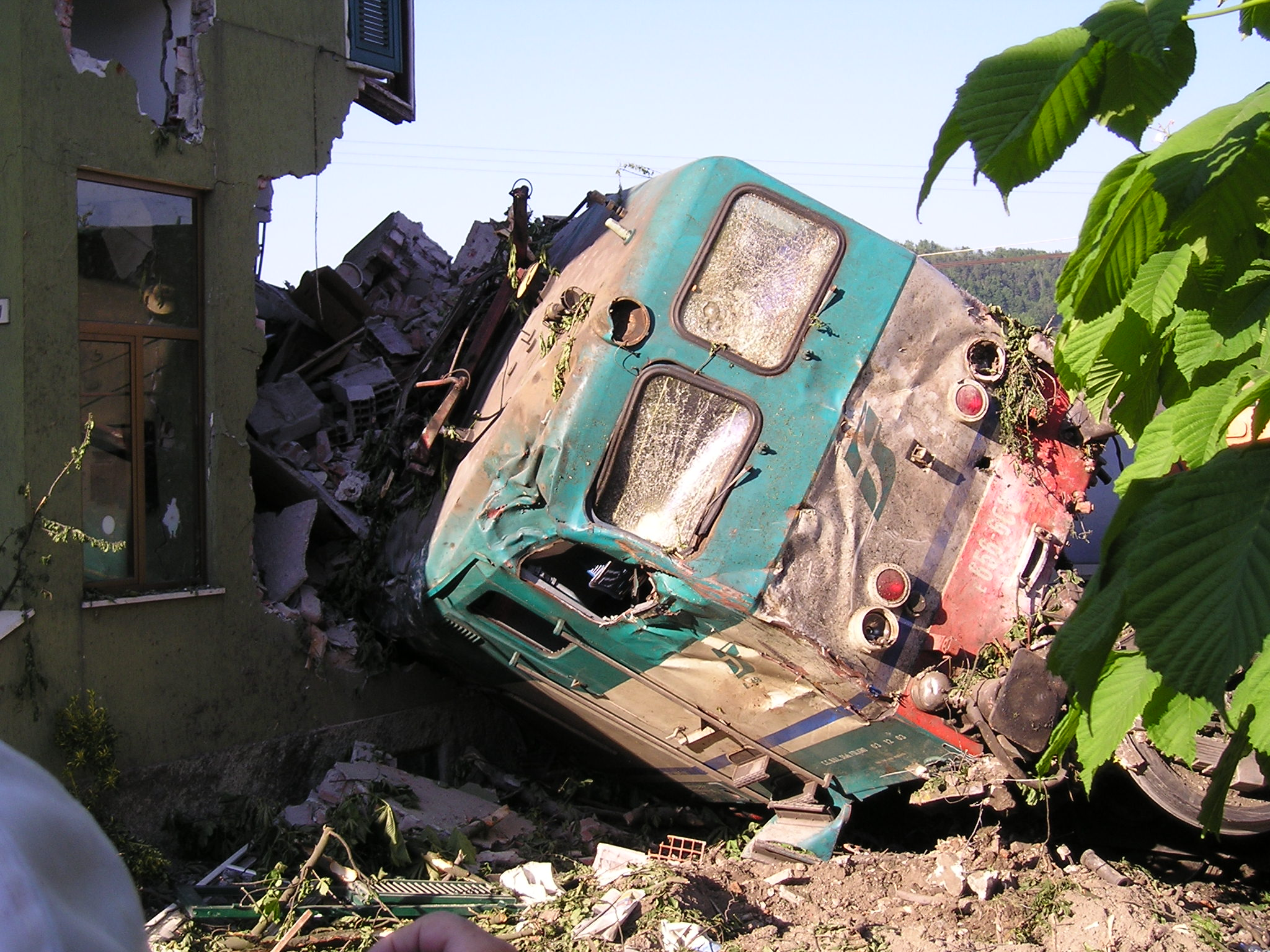 Locomotore dopo deragliamento avvenuto a Libarna di Serravalle Scrivia, sulla linea Milano-Genova, il 17 maggio 2004. Il locomotore E.656.608 del treno interregionale 2050 Livorno-Alessandria-Torino, uscito dai binari, ha sventrato una casa.